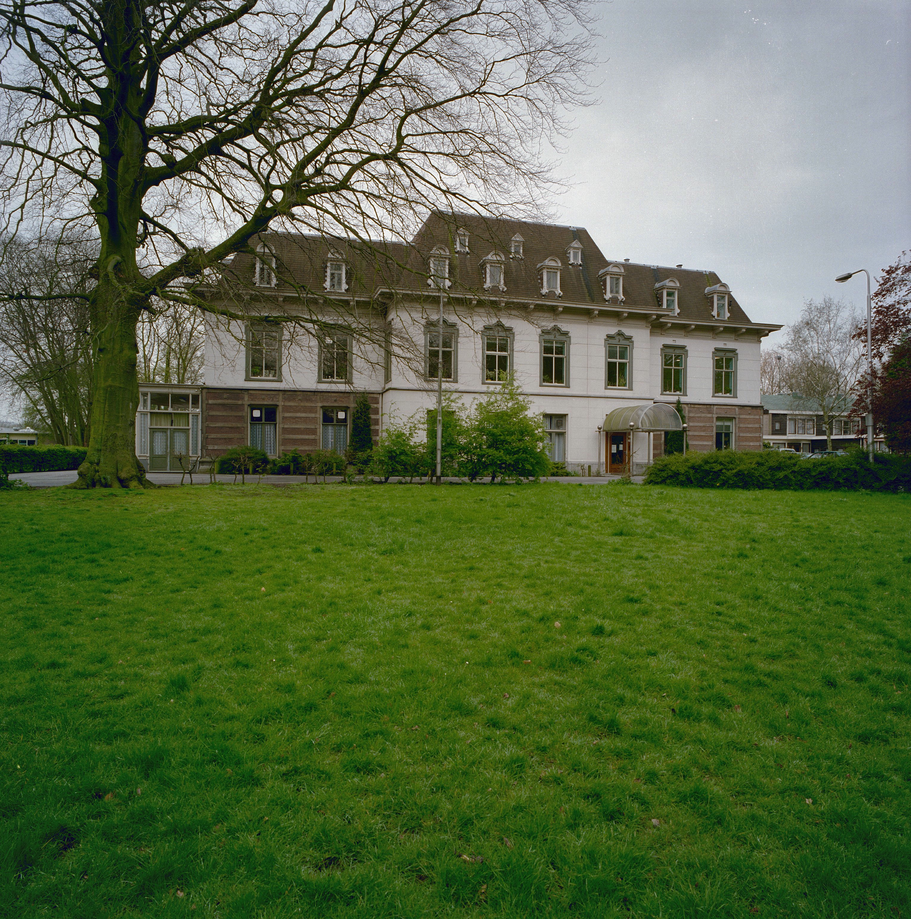 Huis Den Burch: Overzicht voorgevel (opmerking: Gefotografeerd voor Kastelen en Buitenplaatsen in Zuid-Holland)